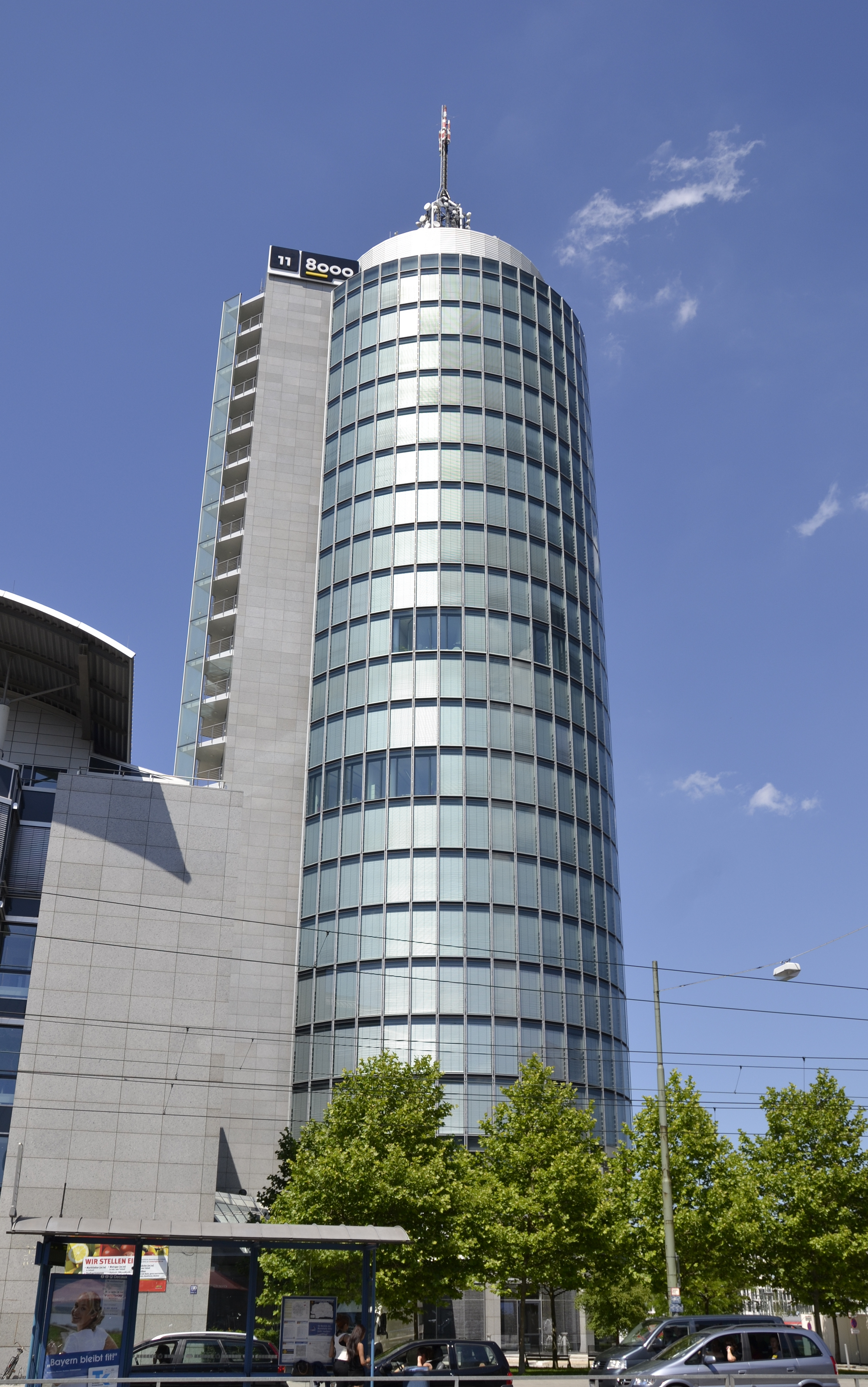 Der Central Tower München im Münchner Stadtteil Schwanthalerhöhe.